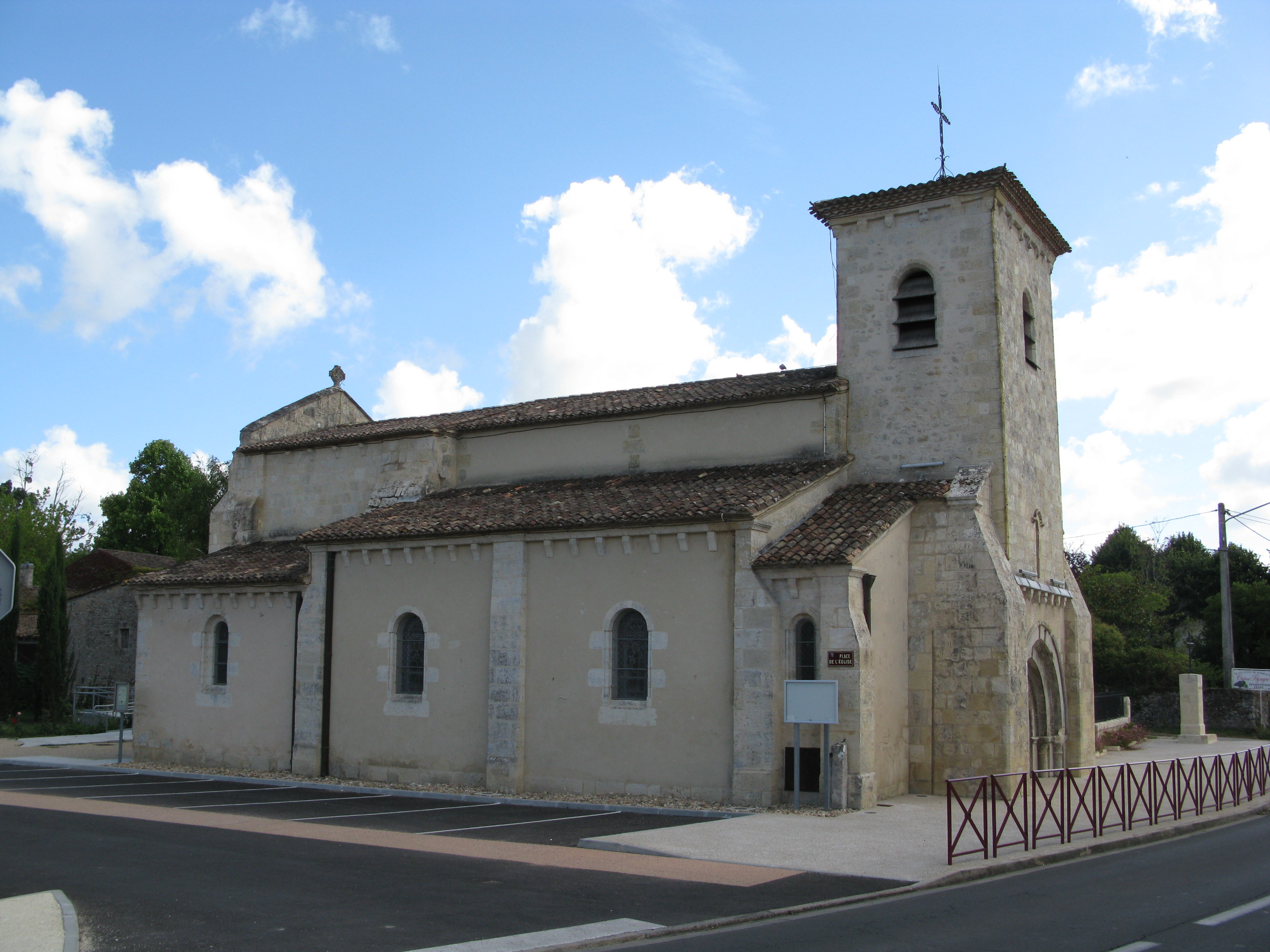 Église de Saint-Martin-Lacaussade, (Inscrit, 1925) .